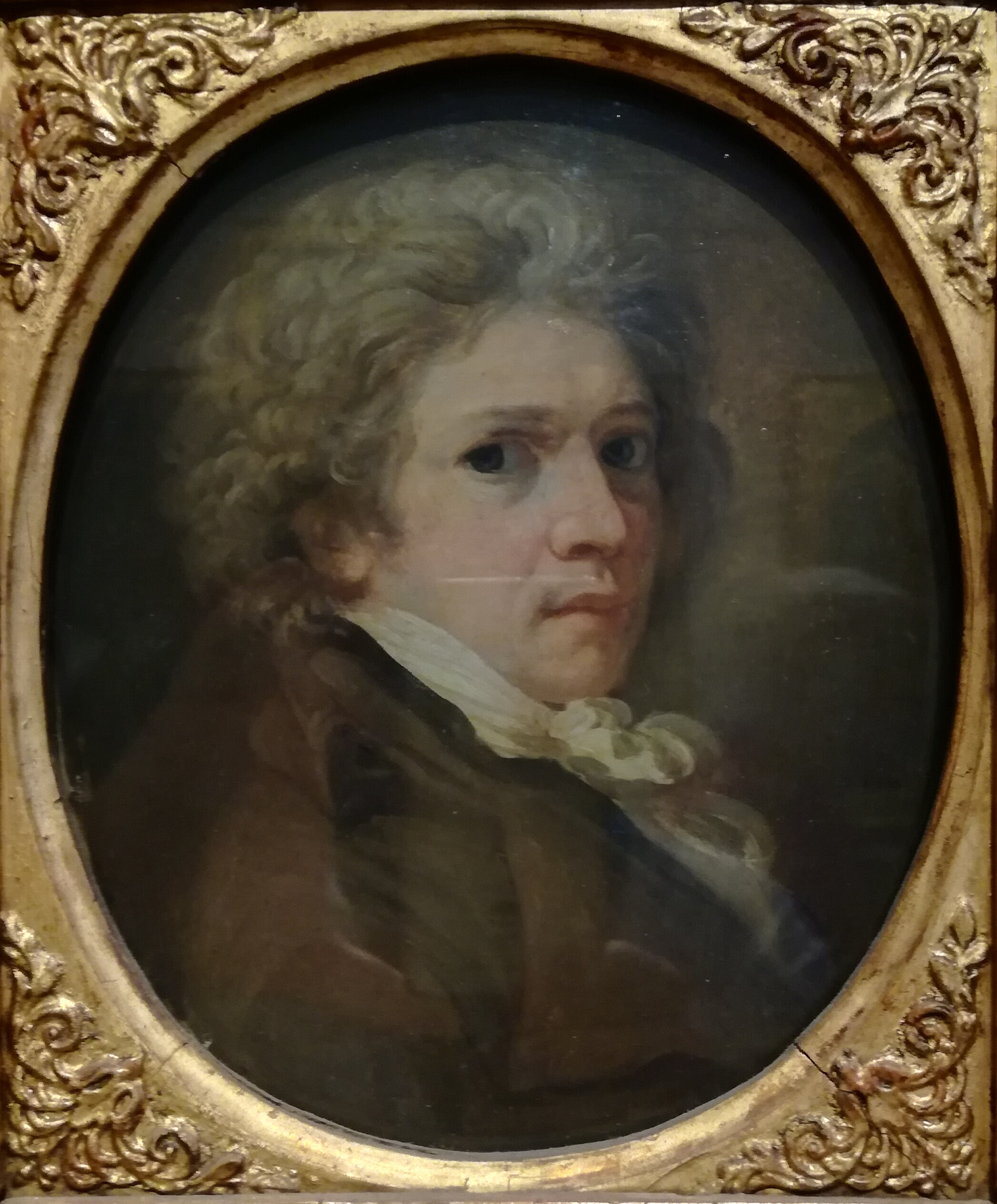 Andrea Appiani, autoritratto, Pinacoteca di Brera Milano